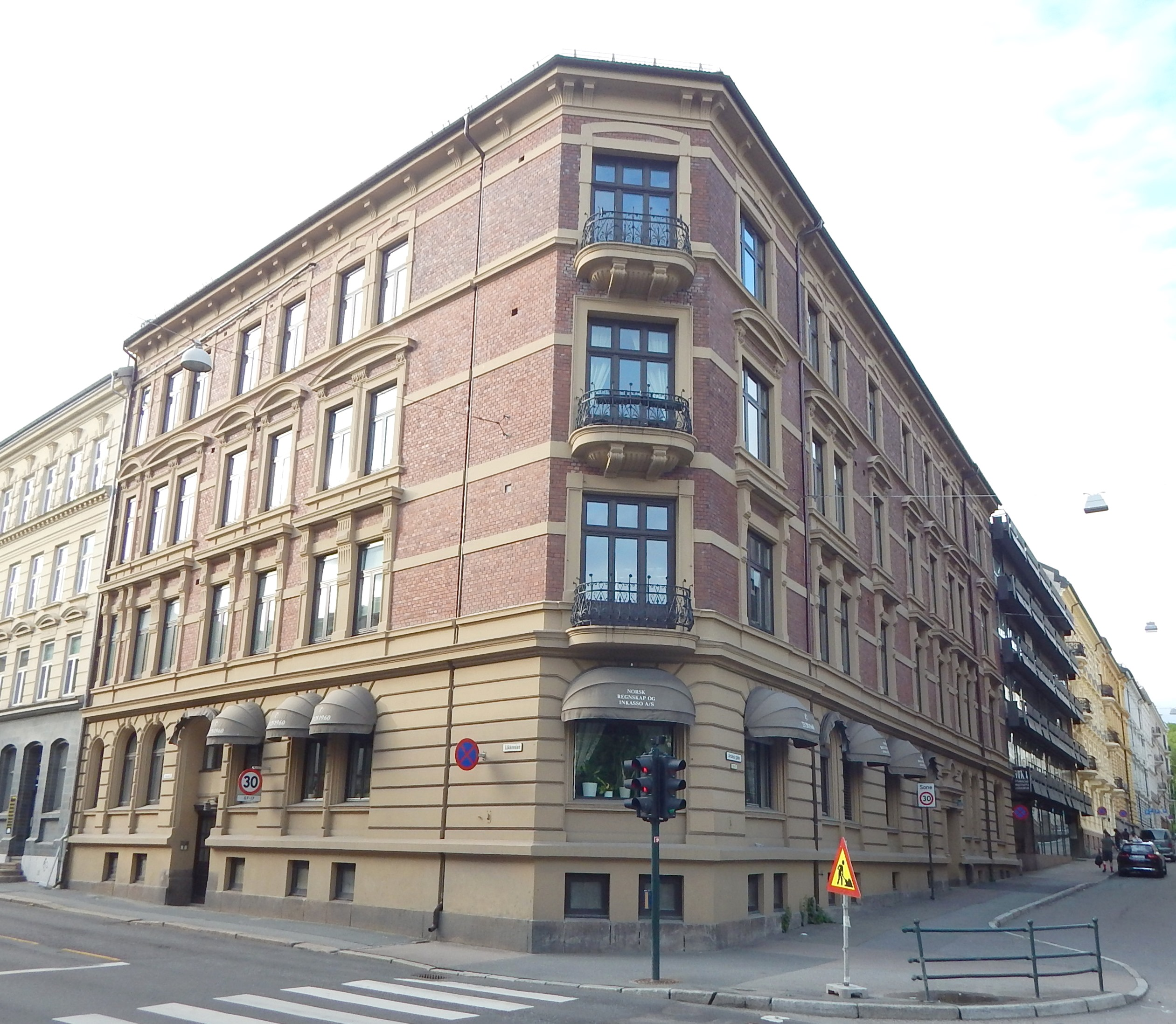 Arbins gate 13. Arkitekt: Adolf Agthe (1894).